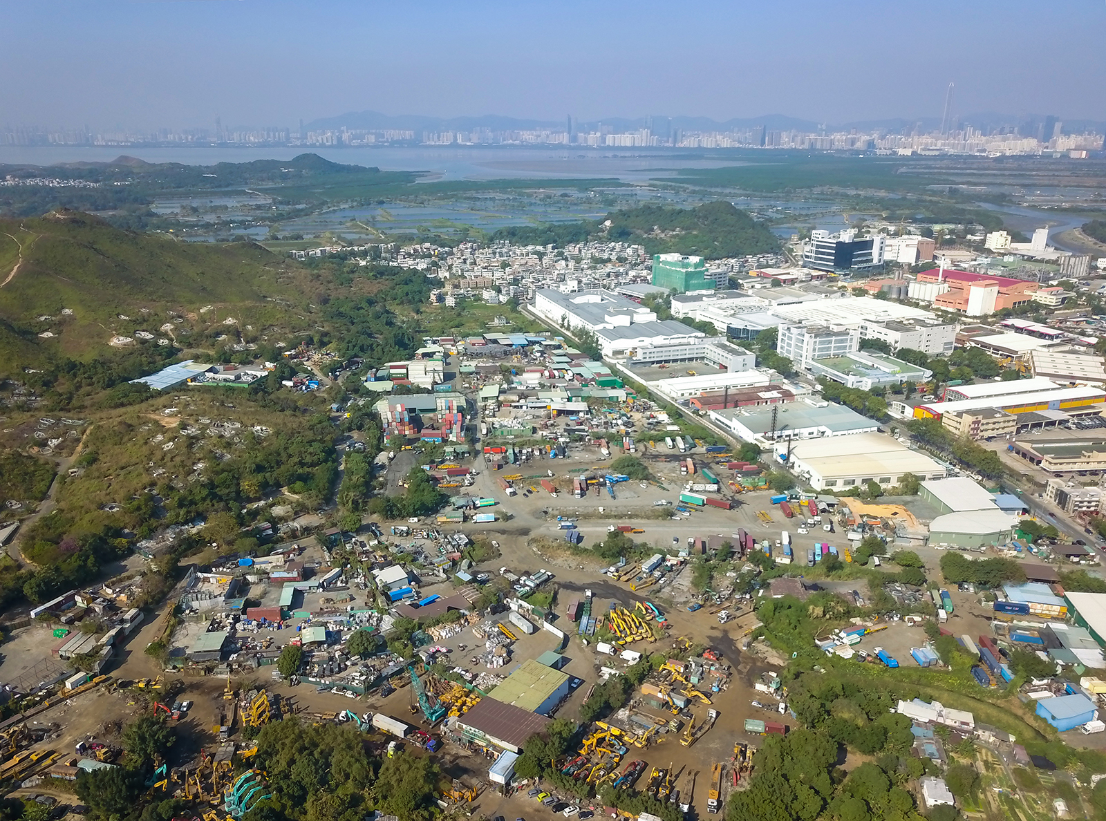 Wang Chau Overview